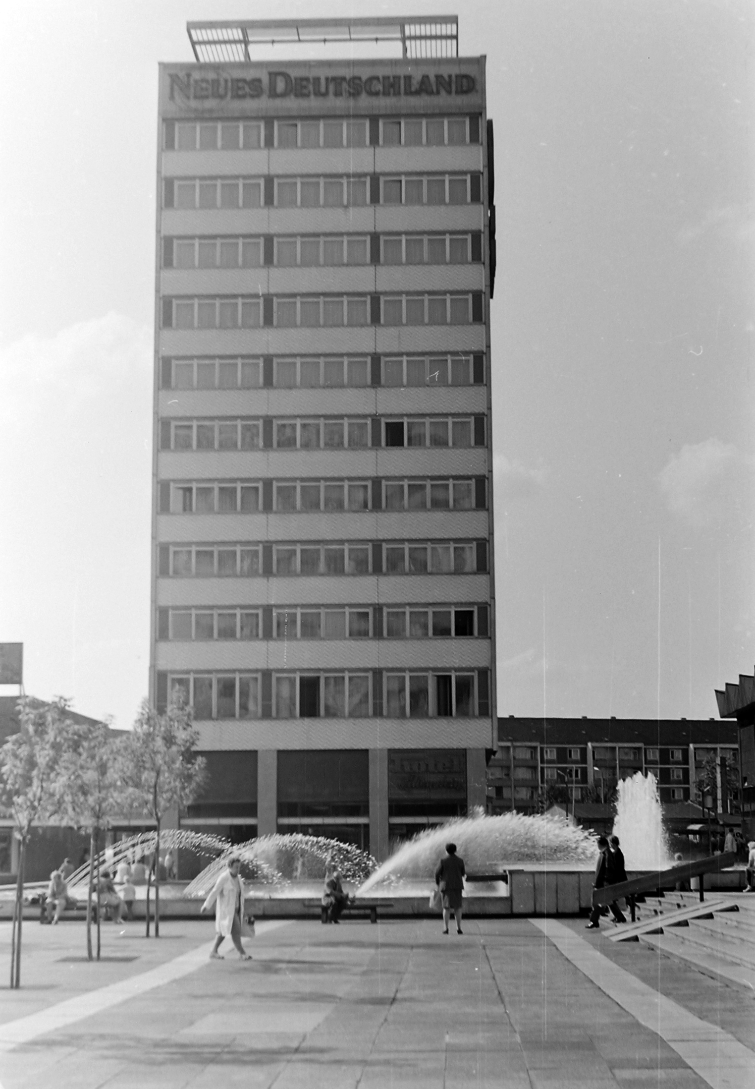 Prager Strasse. (Dresden, Germany) Location: Germany, Dresden Tags: fountain, GDR Title: Prager Strasse. (Dresden, Germany)